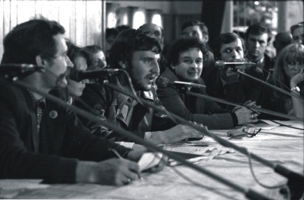 Lech Wałęsa, Andrzej Kołodziej podczas obrad MKZ w Stoczni Gdańskiej im. Lenina w sierpniu 1980, z Lechem Kaczyńskim.